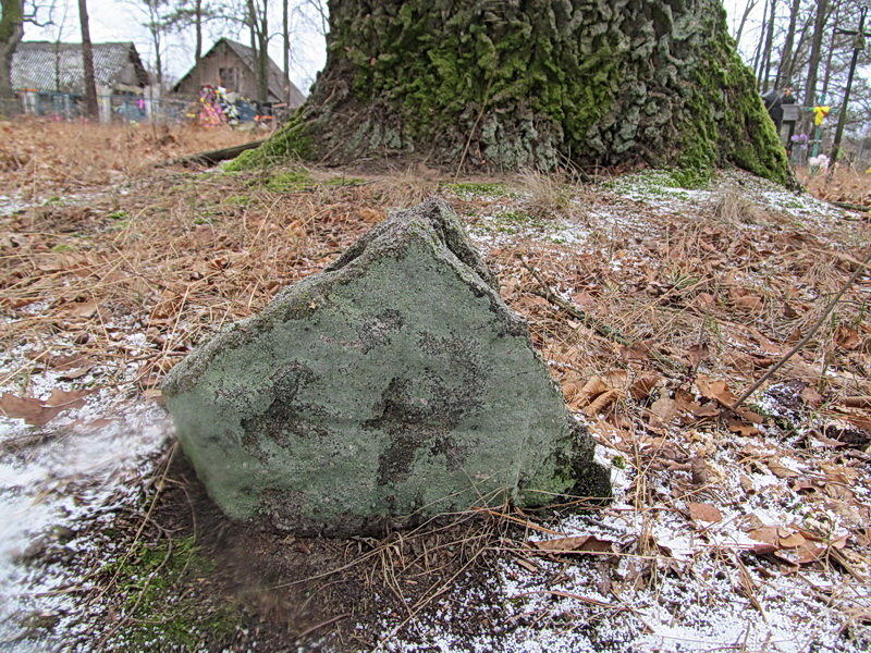 Пасека. Старыя хрысціянскія могілкі